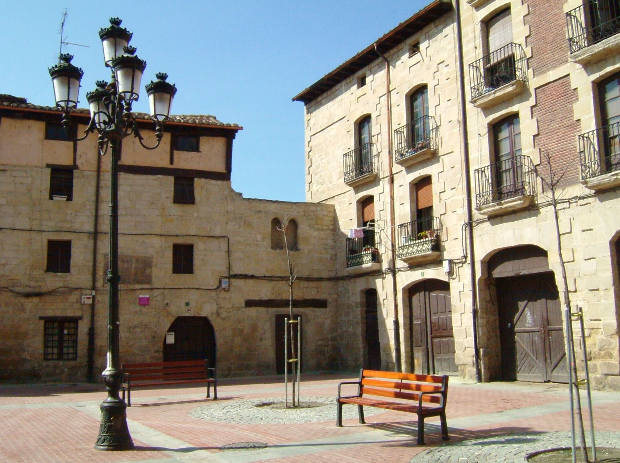 Vista del casco histórico de Miranda de Ebro. Los edificios de la derecha corresponden a los construidos a partir de 1875 en la nave principal de la iglesia de San Juan. Los dos arquillos corresponde, probablemente, a la casa del concejo.